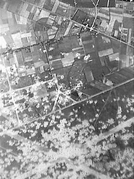 Geallieerde opnamen van door oorlogsgeweld vernield vliegveld Uden